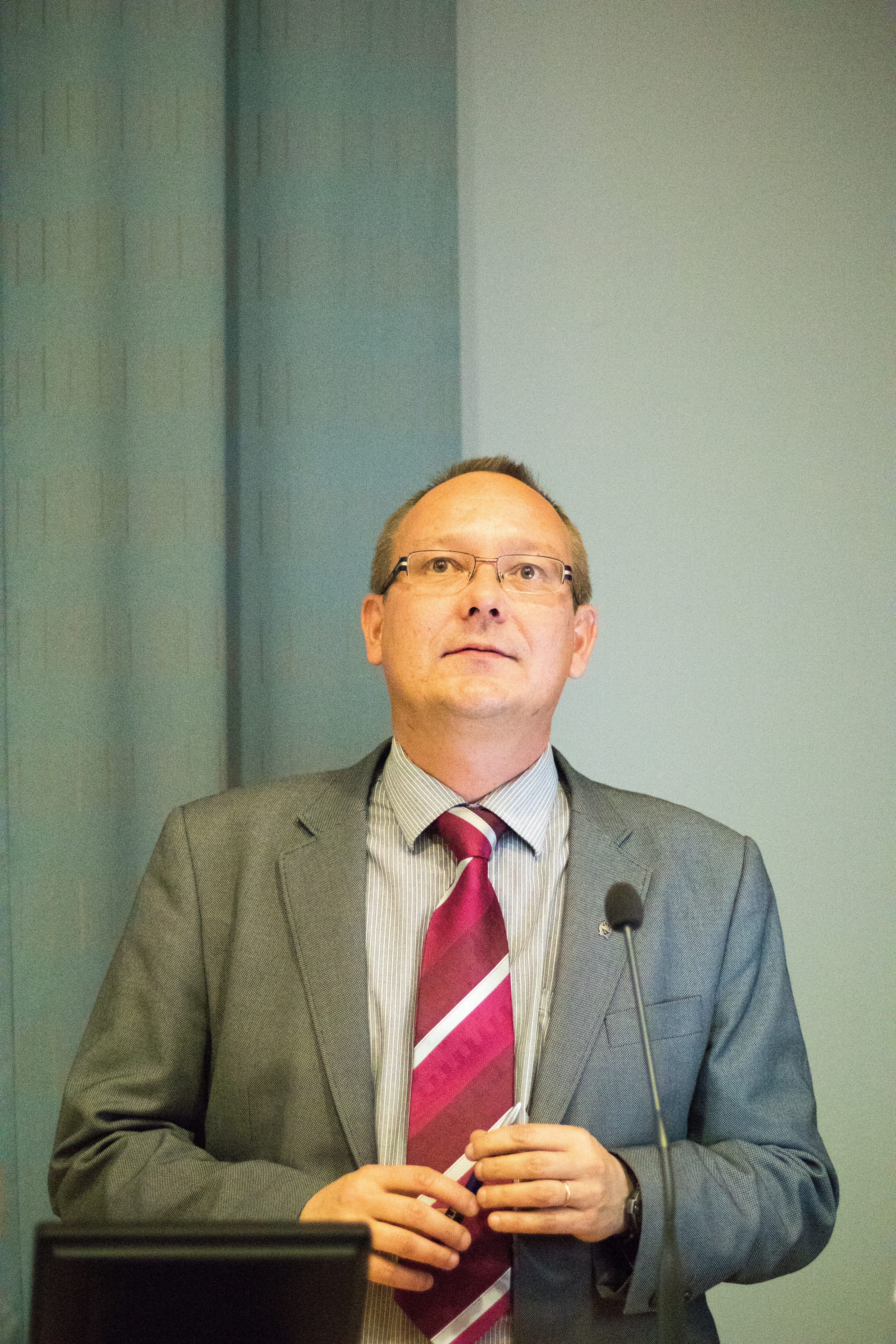 Juha-Antero Puistola suomalainen kirjailija